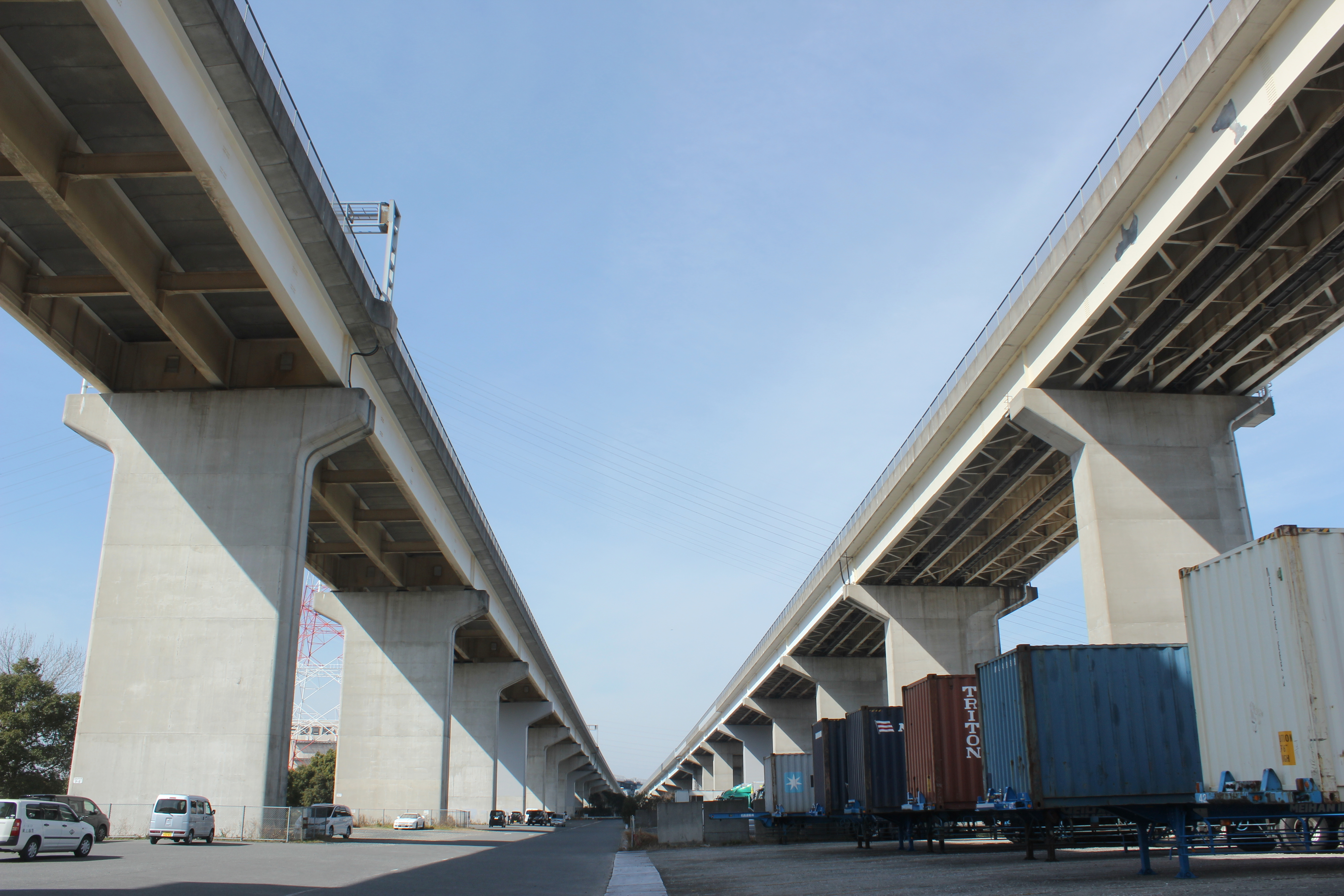 伊勢湾岸道路 飛島高架橋。